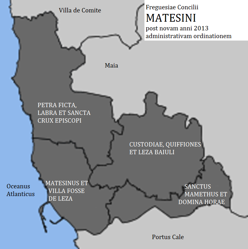 Concilii Maiae freguesiae post novam anni 2013 ordinationem administrativam